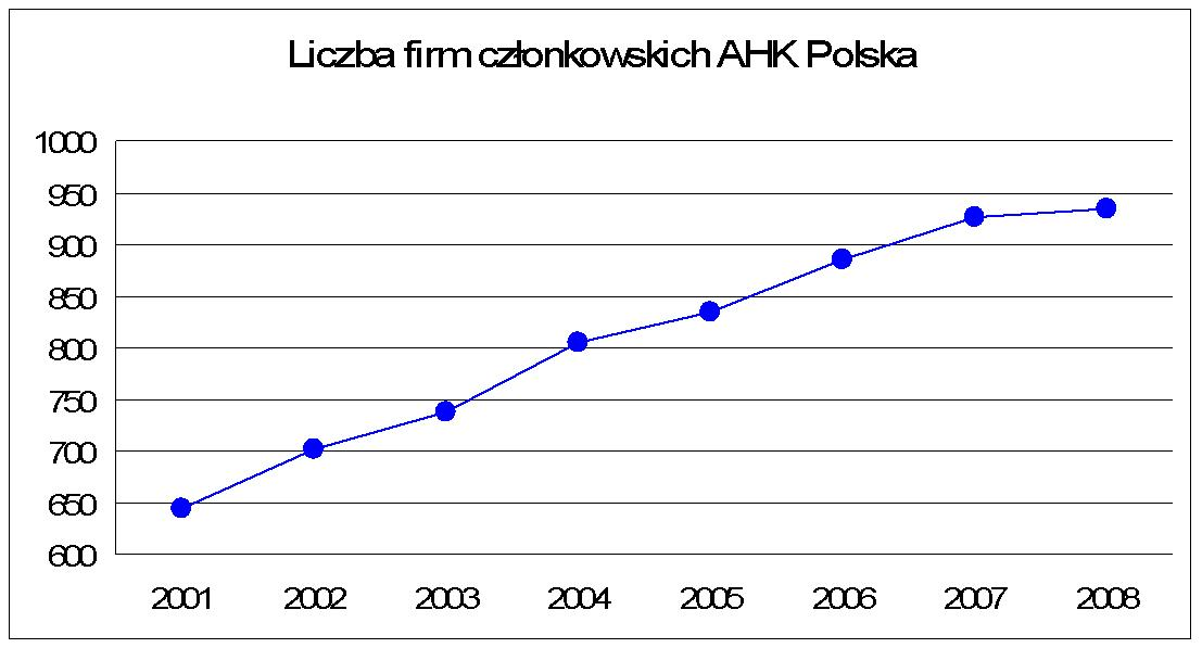 Liczba firm członkowskich PNIPH